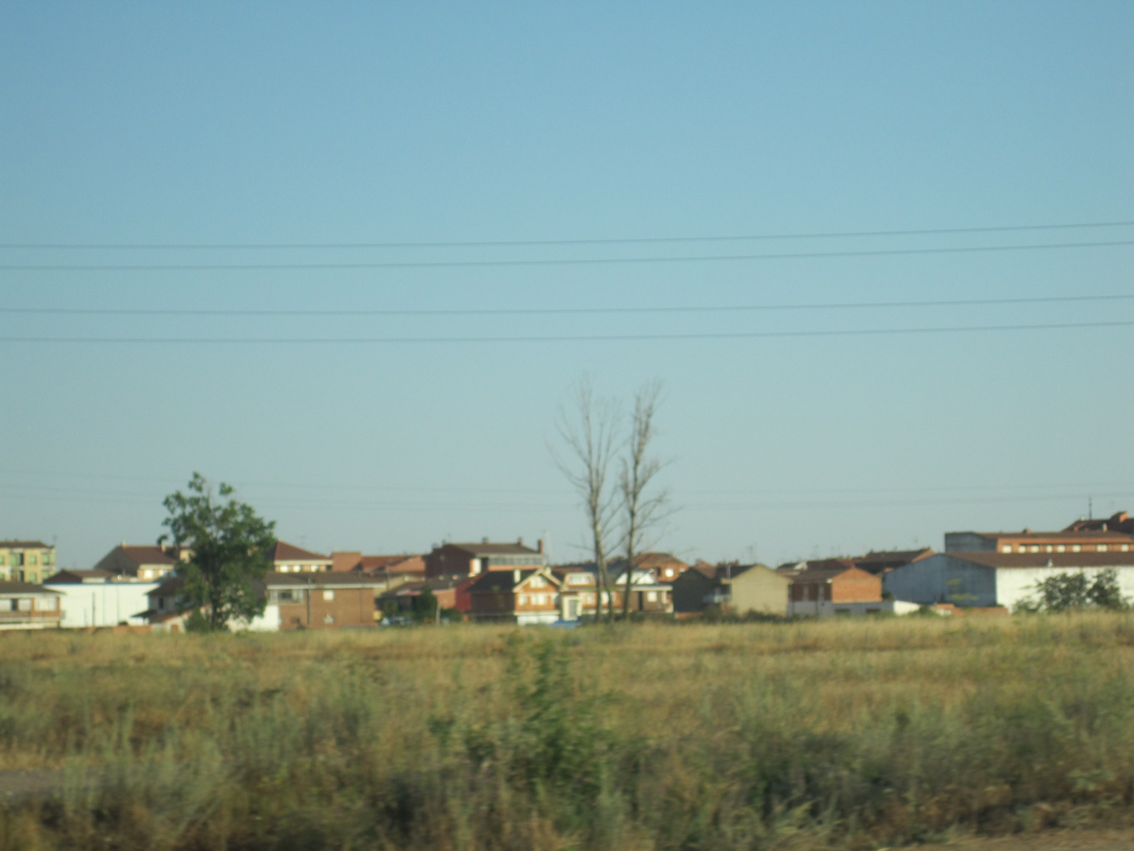 Vista de la localidad de Santa María del Páramo.